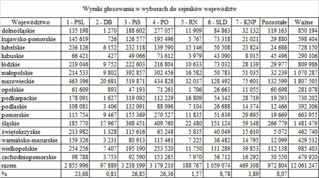 Niniejsze zestawienie zostało upublicznione przez PKW wraz ze sprostowaniem po konferencji prasowej z 22 listopada 2014. Bazuje ono na pierwotnej wersji protokołu z województwa śląskiego i innych województw w których korekty były dokonywane później. Zaprezentowane w nim wyniki sumaryczne komitetów są błędne. Zgodnie z ostatecznymi wersjami protokołów w wyborach do sejmików województw w skali kraju komitety uzyskały następujące wyniki: PiS 26,89%; PO 26,29%; PSL 23,88%; SLD 8,79%; KNP 3,89%; RN 1,57%; DB 0,81%.